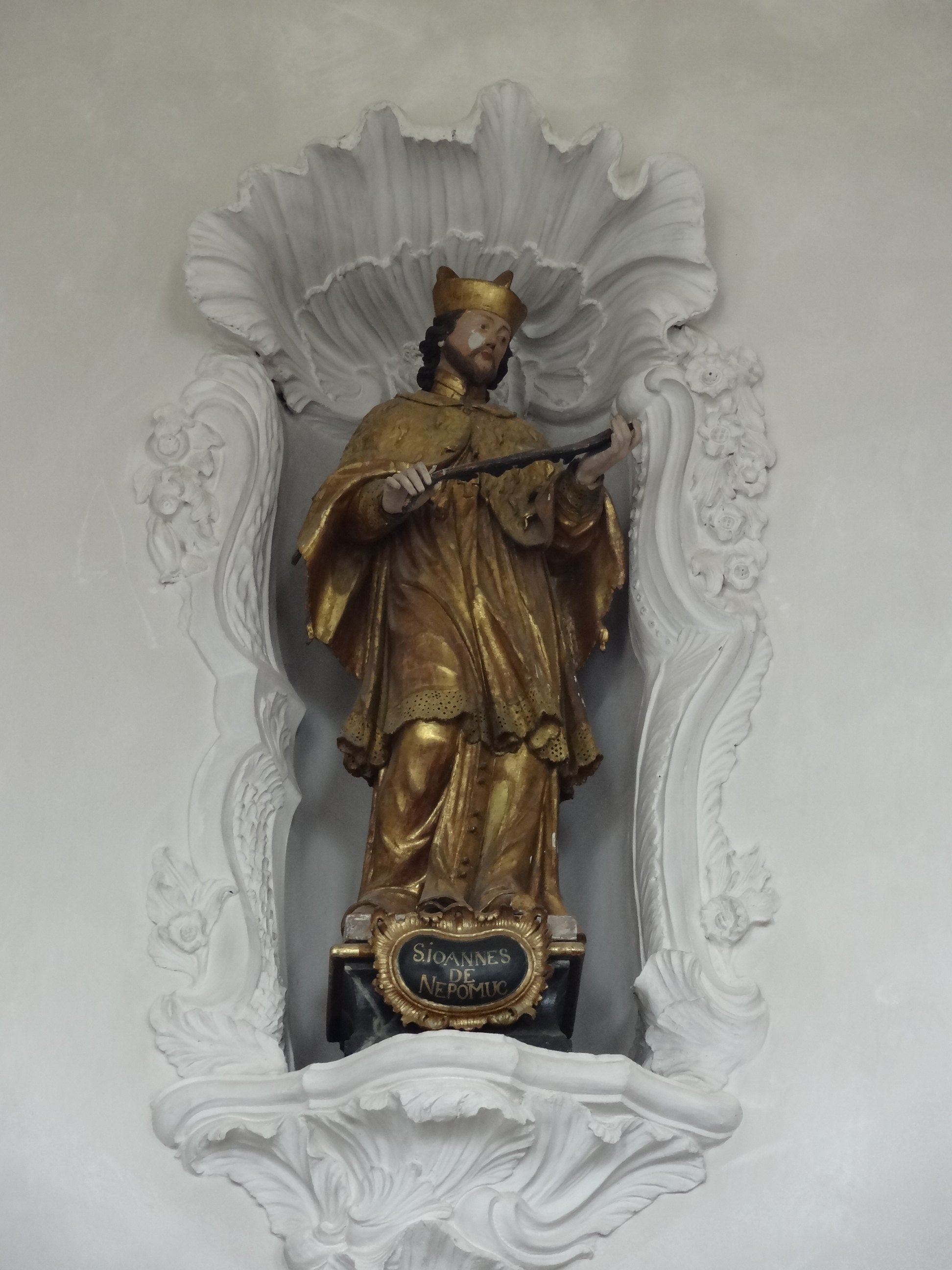 Klosterkirche (JVA Rockenberg)